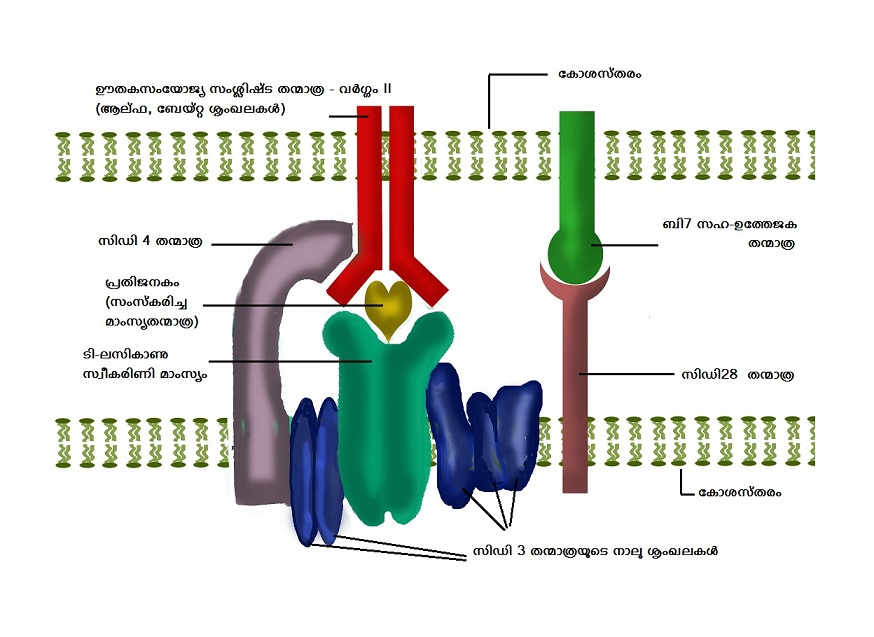 പ്രതിജനകാവതാരക കോശവും ടി-ലസികാണുവും തമ്മിലെ പ്രതിപ്രവർത്തനത്തിന്റെ തന്മാത്രാതല ചിത്രം. മുകളിൽ കാണുന്ന കോശസ്തരം പ്രതിജനകാവതാരക കോശത്തിന്റേതാണ്.പ്രസ്തുതകോശം ഉള്ളിലിട്ട് സംസ്കരിച്ച പ്രതിജനക പെപ്റ്റൈഡിനെ ഊതകസംയോജ്യ തന്മാത്രയോടുചേർത്ത് കോശസ്തരത്തിൽ പ്രദർശിപ്പിക്കുന്നു. ഇതിനോട് ബന്ധപ്പെടാനെത്തുന്ന സഹായി ടി-ലസികാണുക്കൾ പ്രസ്തുത കോശവുമായും പ്രതിജനകവുമായും തന്മാത്രാതല ബന്ധങ്ങൾ സ്ഥാപിക്കുന്നു.ടി-കോശസ്വീകരിണിയുമായുള്ള ഊതകസംയോജ്യ-പ്രതിജനക സംശ്ലിഷ്ടത്തിന്റെ ബന്ധനമാണ് ഉത്തേജനത്തിന്റെ ആദ്യ സിഗ്നൽ ടി-കോശത്തിനു നൽകുന്നത്. തുടർന്ന് സിഡി28 എന്ന ടി-കോശ അടയാളതന്മാത്രയും പ്രതിജനകാവതാരക കോശത്തിലെ ബി-7 തന്മാത്രയും തമ്മിലെ ബന്ധനം ഉത്തേജനത്തിന്റെ രണ്ടാം സിഗ്നൽ കൊടുക്കുന്നു. ഈ “ബന്ധപ്പെടൽ” മൂലം ഇരു കോശങ്ങളും ഉത്തേജിപ്പിക്കപ്പെടുന്നതിനെ സഹ-ഉത്തേജനം എന്ന് പറയുന്നു.